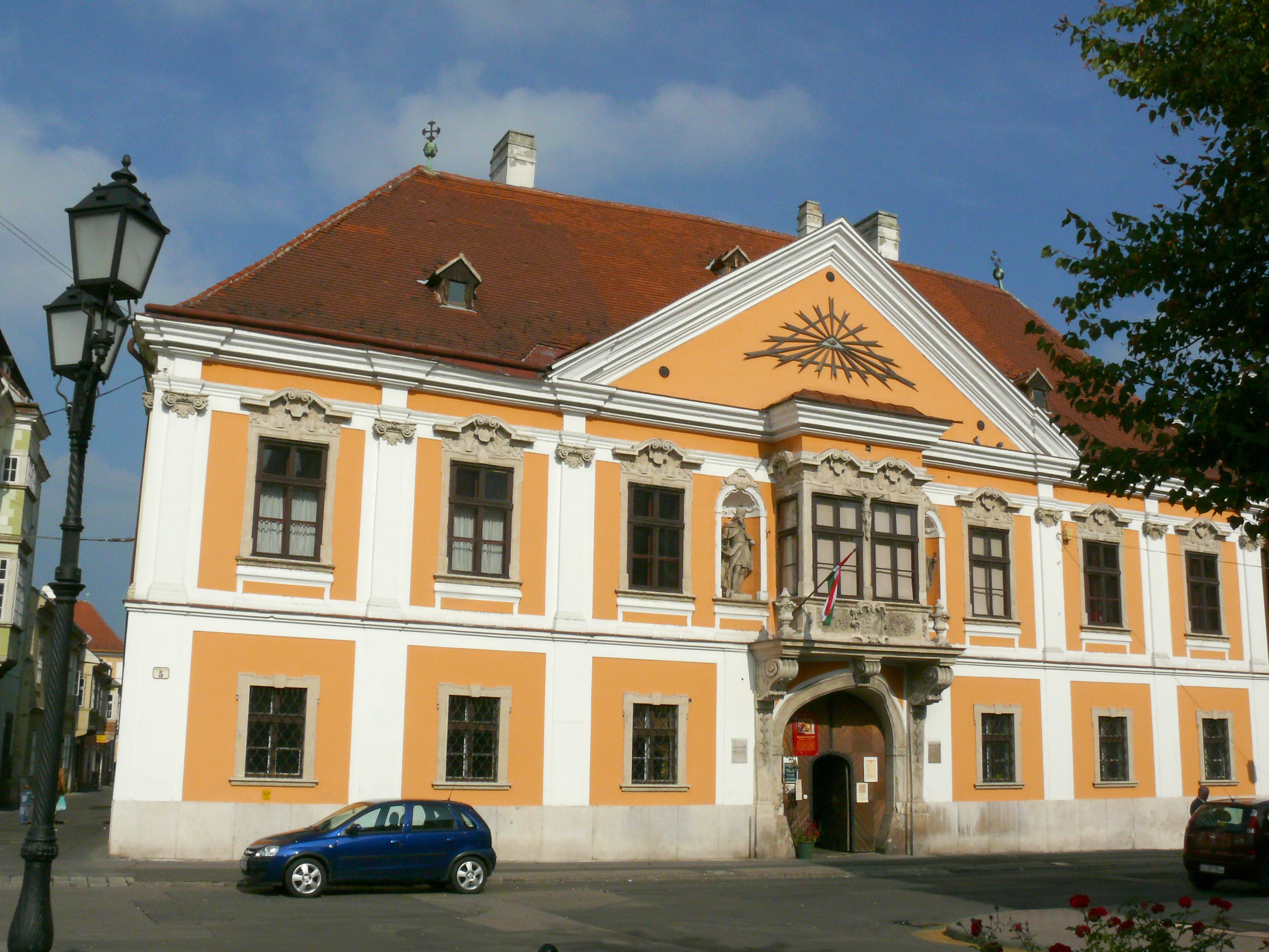 Győr. Az ún. "Apátúr-ház", jelenleg a Xantus János Múzeum. (Saját felvétel, 2006.) Vadaro 2006. június 10., 20:47 (CEST)